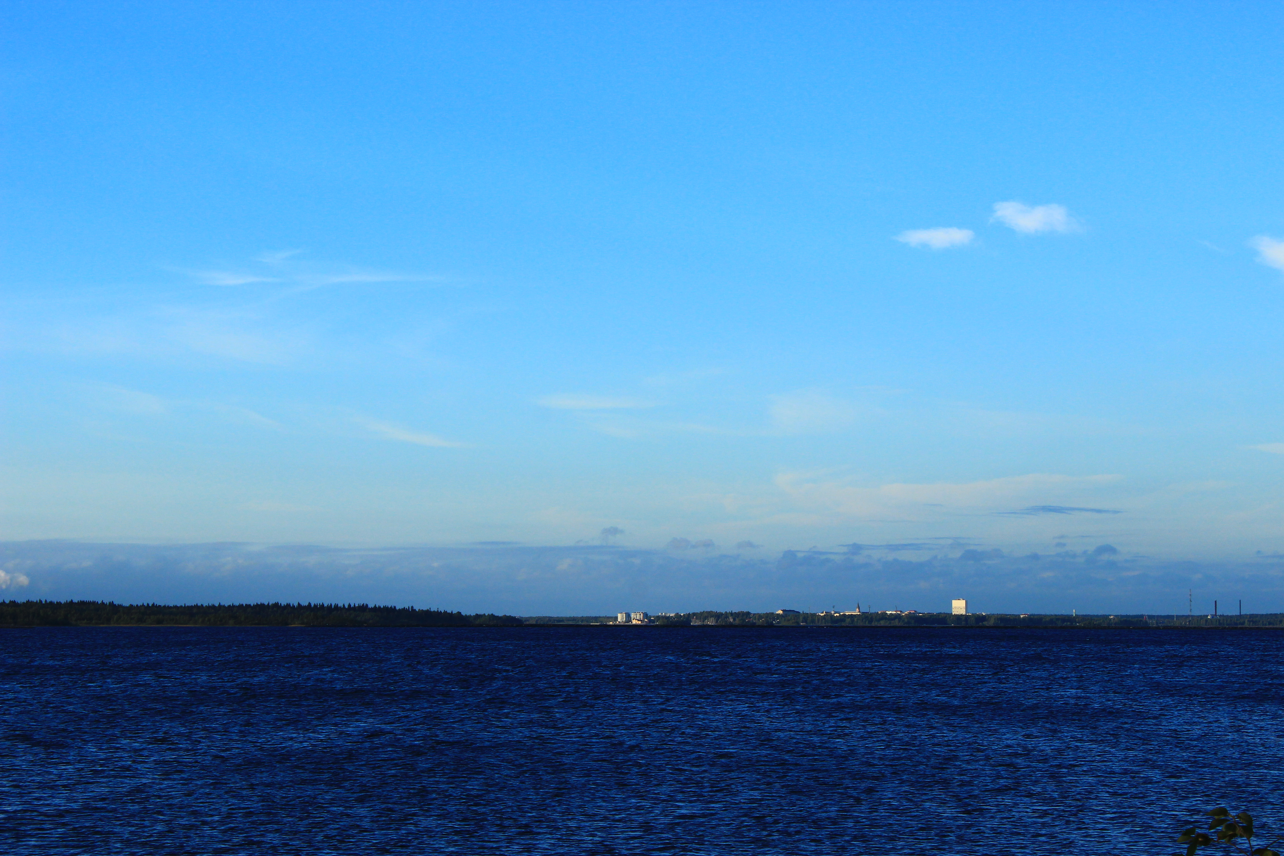 Näkymä Kemiin mereltä päin.